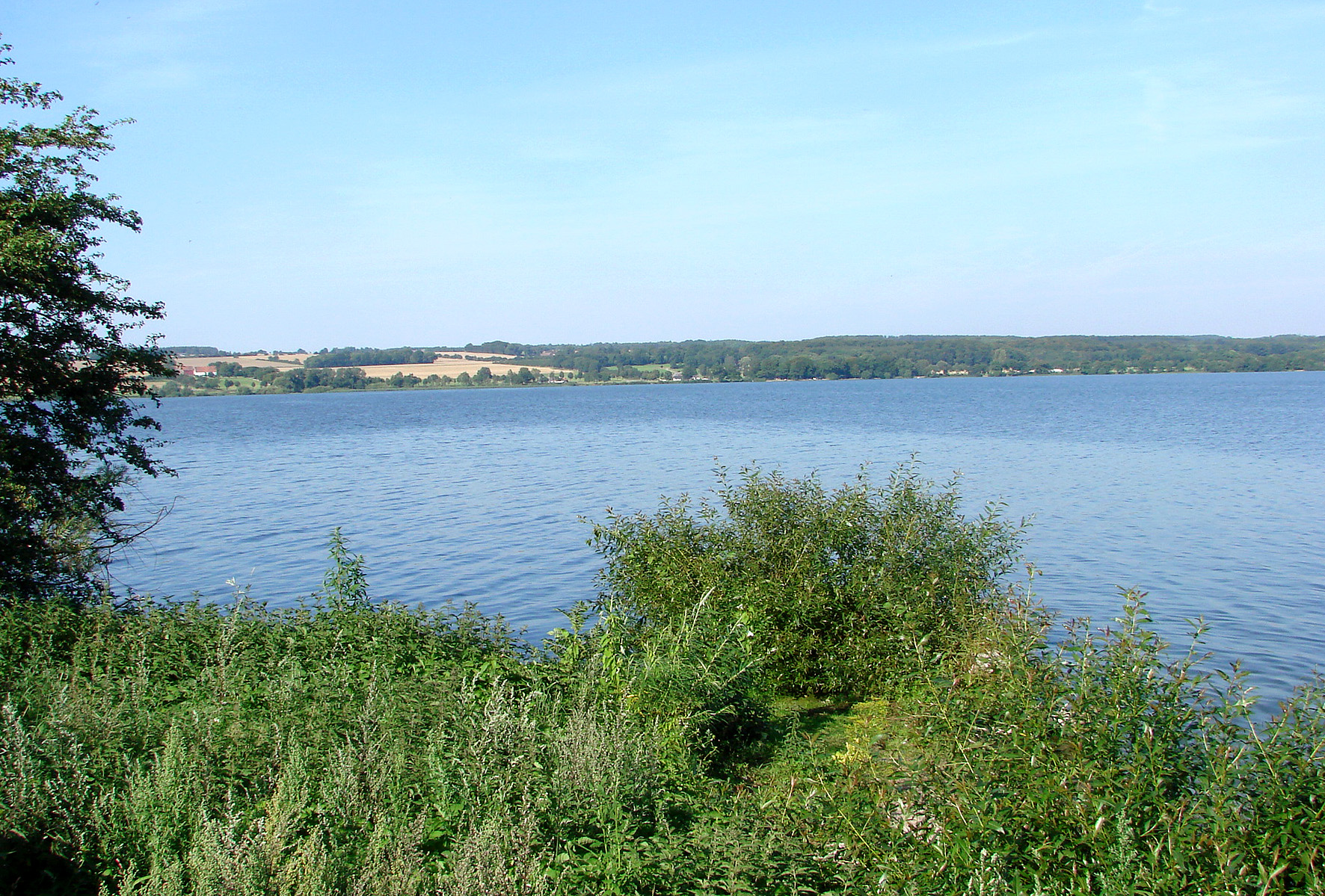 Vombsjön (ibland även Våmbsjön) är en sjö i Skåne 20 kilometer öster om Lund.